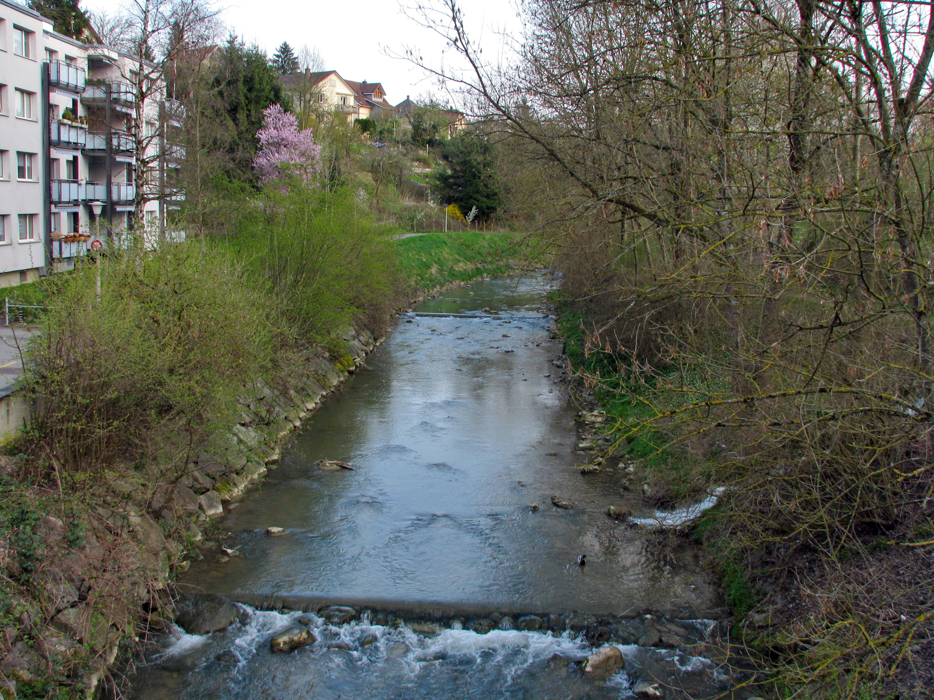 Reppisch in Dietikon (Switzerland)